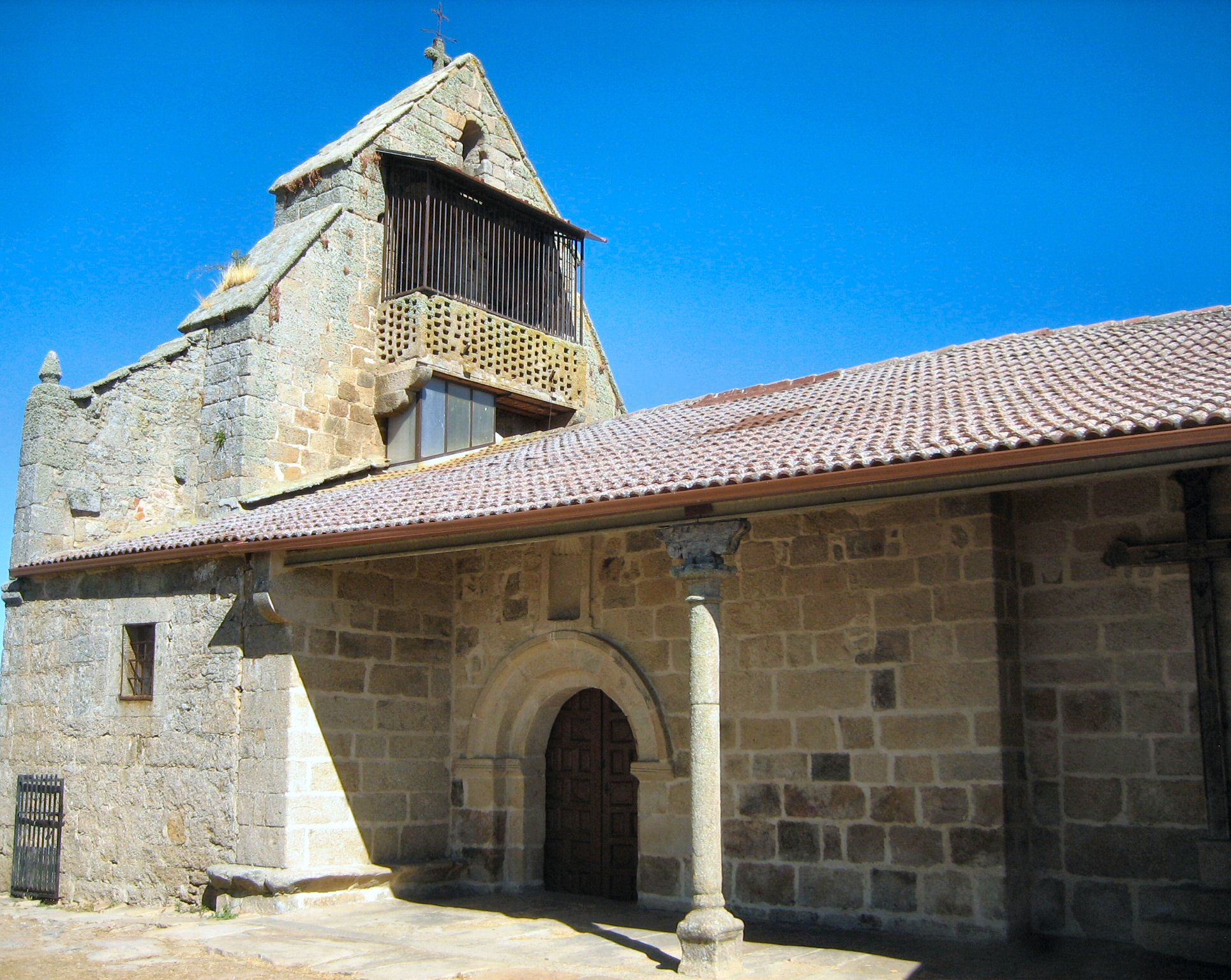 Entrada y atrio de la iglesia de Villamor de la Ladre